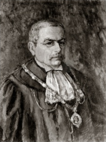 Wilhelm von Blume (*9. Mai 1867 in Berlin; † 2. Oktober 1927 in Tübingen) Tübinger Professor ), Gemälde von Klipstein-Blass